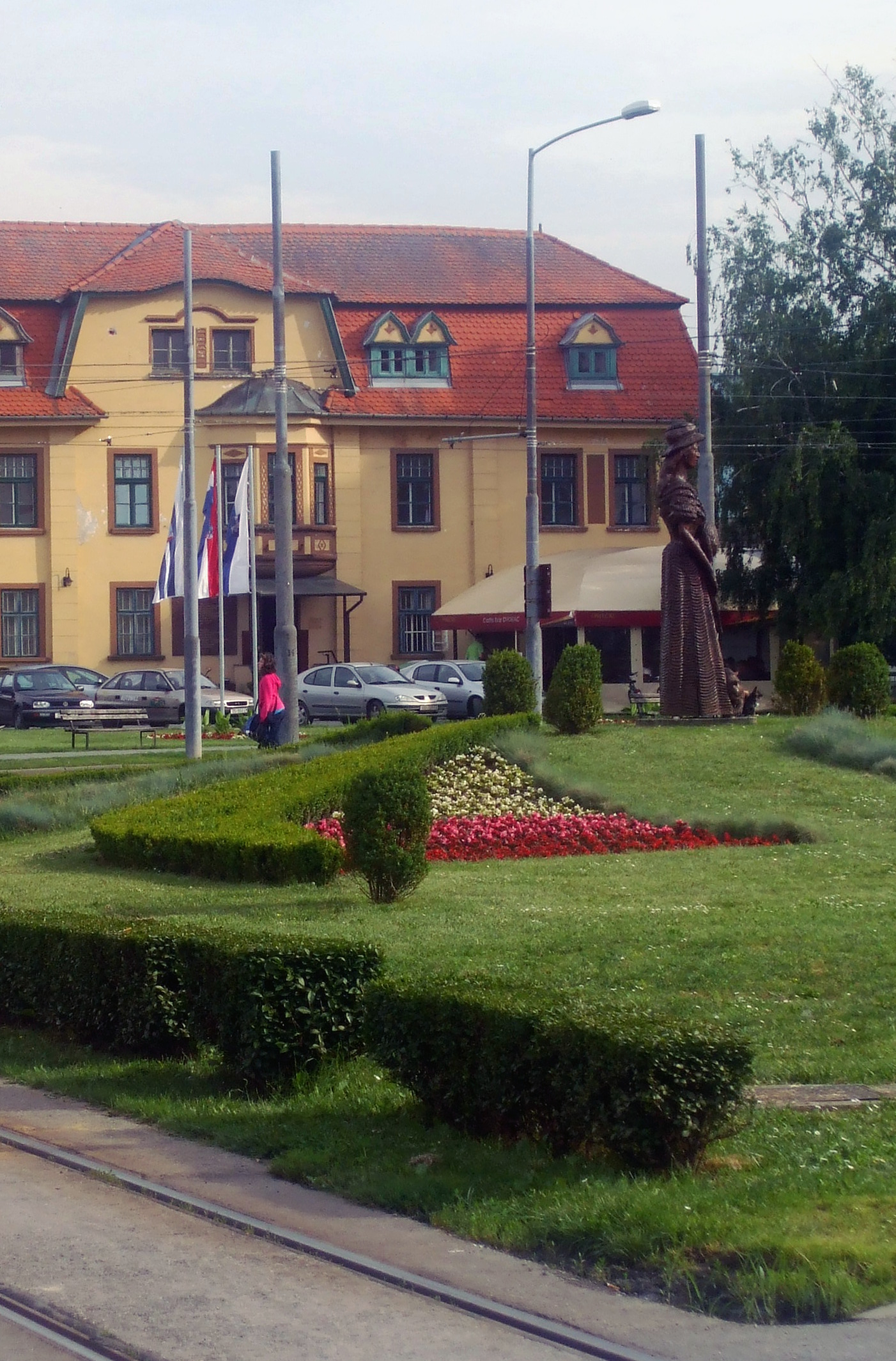 Pogled s tramvajske stanice Mačkamama prema kipu Pauline Hermann i dvorcu Mačkamama.